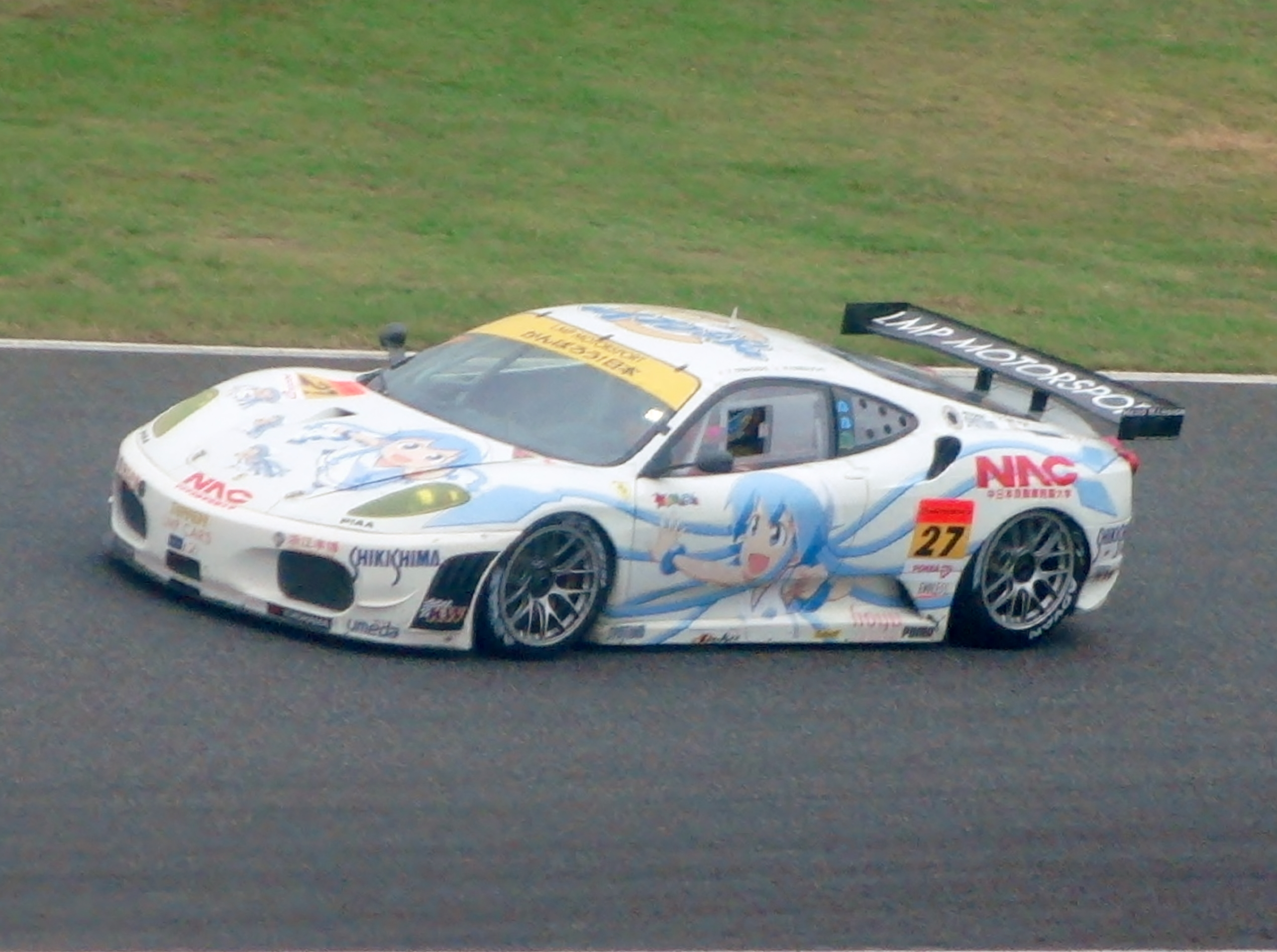 2011年ポッカGTサマースペシャルにおいて27号車PACIFIC NAC イカ娘フェラーリを撮影。